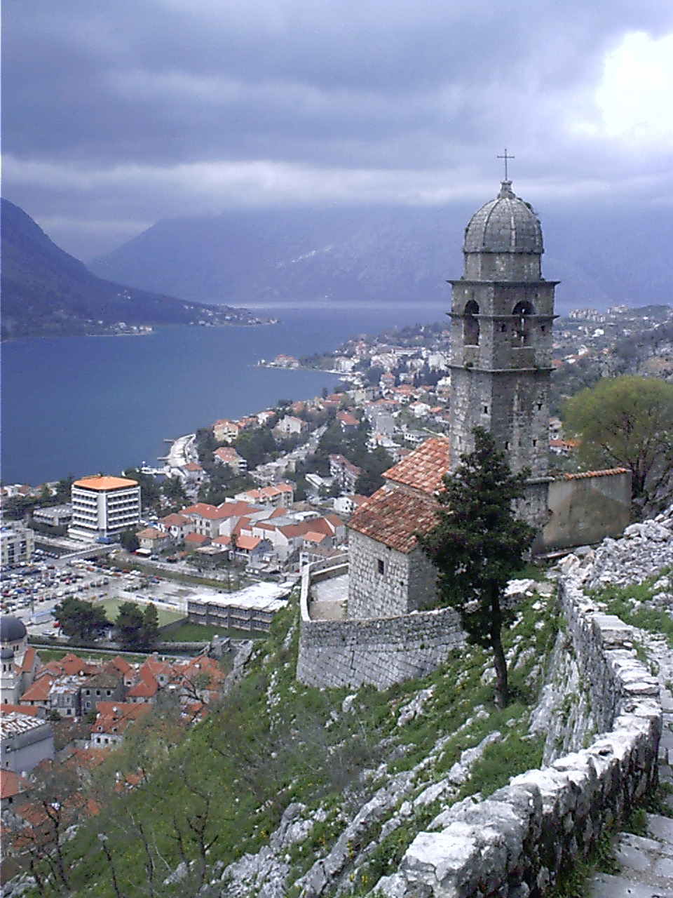 Kotor, Montenegro099 Kotor Castillo